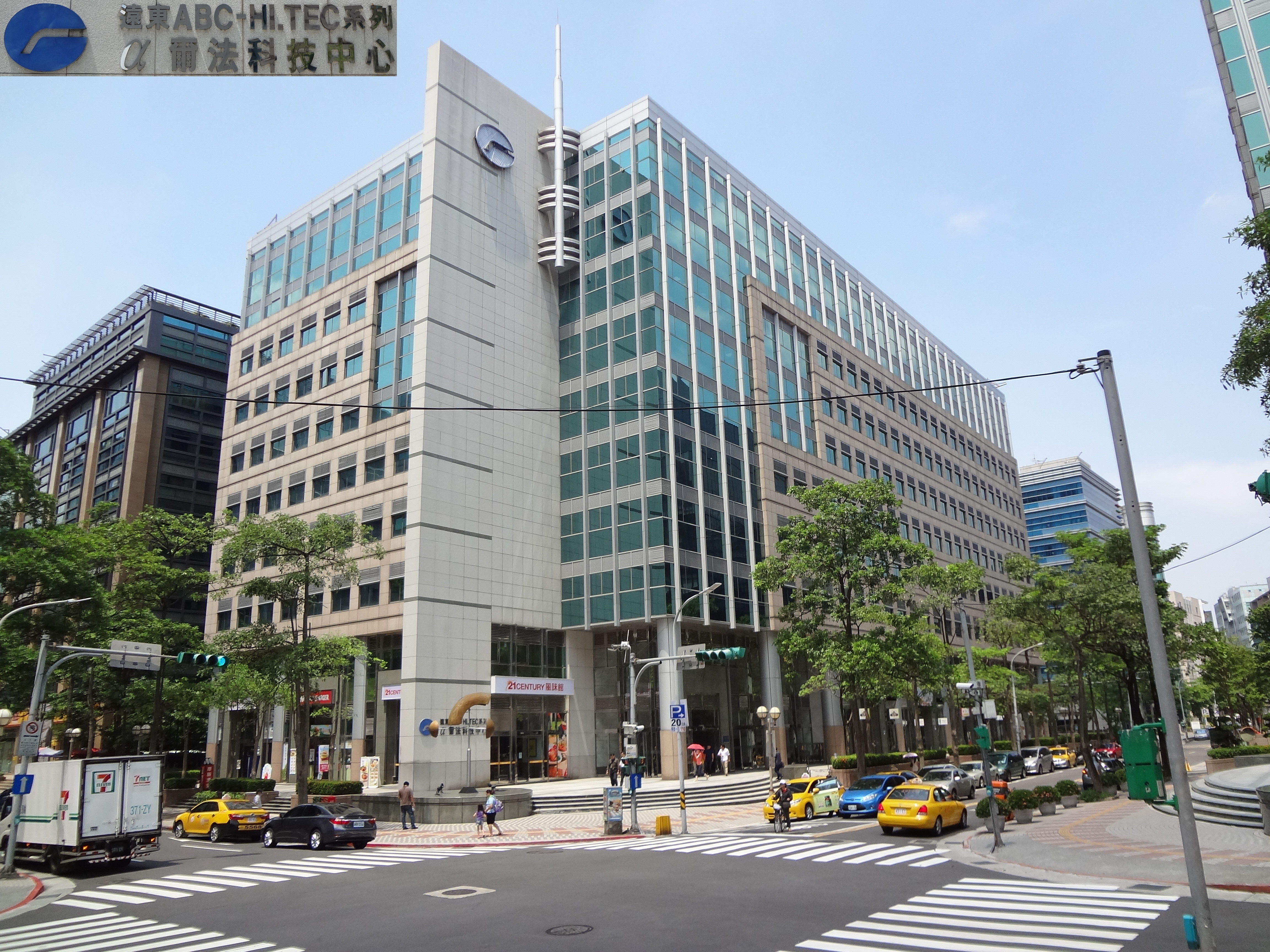 臺灣臺北市內湖區洲子街與瑞光路513巷交叉口，遠東建設「爾法科技中心」。廣穎電通總部位於洲子街106號7樓，無敵科技總部位於瑞光路513巷36號10樓。